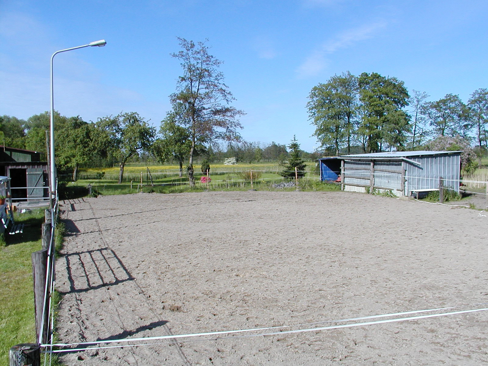 Ein Paddock